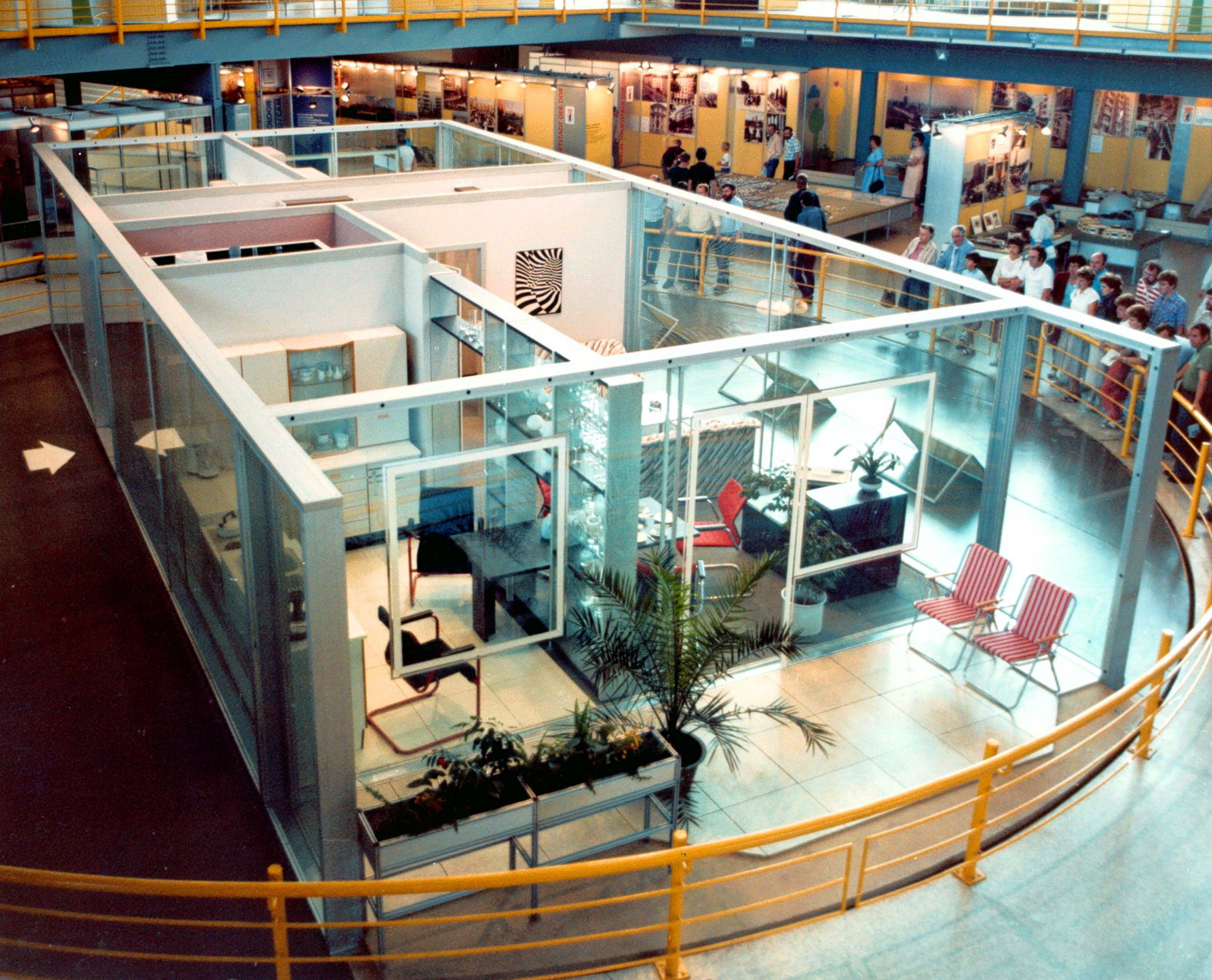 24.07.1987 DDR 1000 [13053] Berlin-Weißensee, Ho-Chi-Minh-Straße 51-55/ Ecke Berliner Straße (GMP: 52.538992,13.472368): Bauausstellung der DDR auf dem Gelände des Sportforum Berlin neben der Dynamo-Sporthalle. Hier eine der zu tausenden gebauten Plattenbau WBS 70 3-Raum-Wohnung im Glasmodell. Im Vordergrund der 6 m lange Balkon. [R19870711A14.jpg]19870724200NR.JPG(c)Blobelt